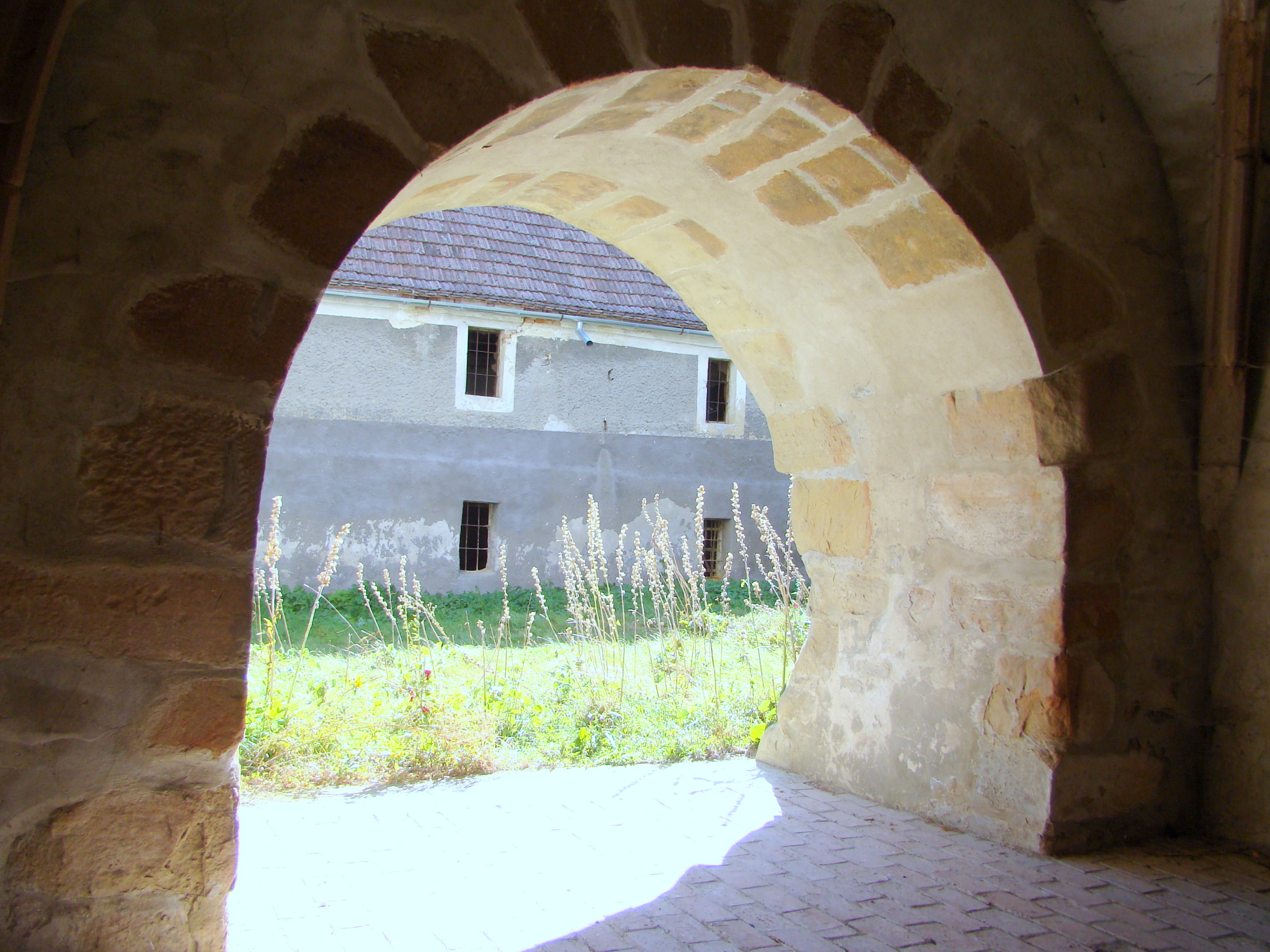 Incintă fortificată (fragmente), cu încăpere pentru provizii, sat Șoarș; comuna Șoarș 282 sec. XV - XVI 02